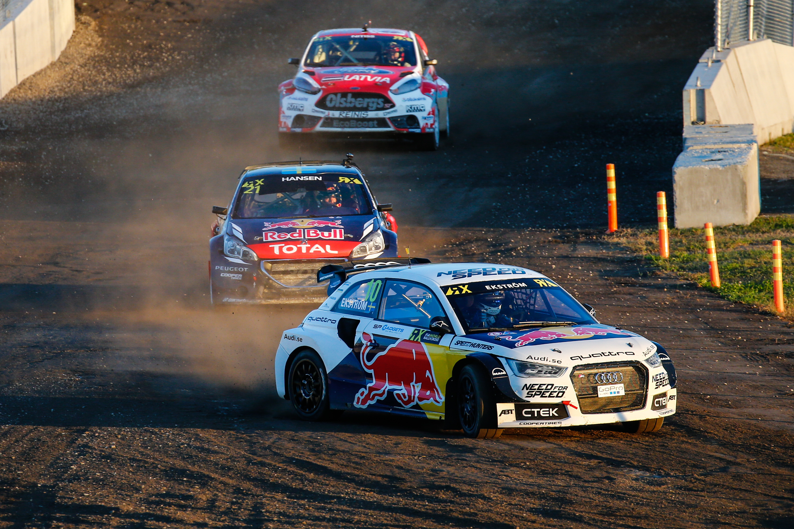 Mattias Ekström (Audi S1 EKS RX quattro)